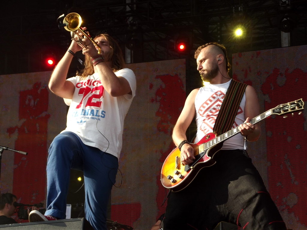 Zdjęcie zrobione podczas drugiego dnia Life Festivalu 2013 w Oświęcimiu.